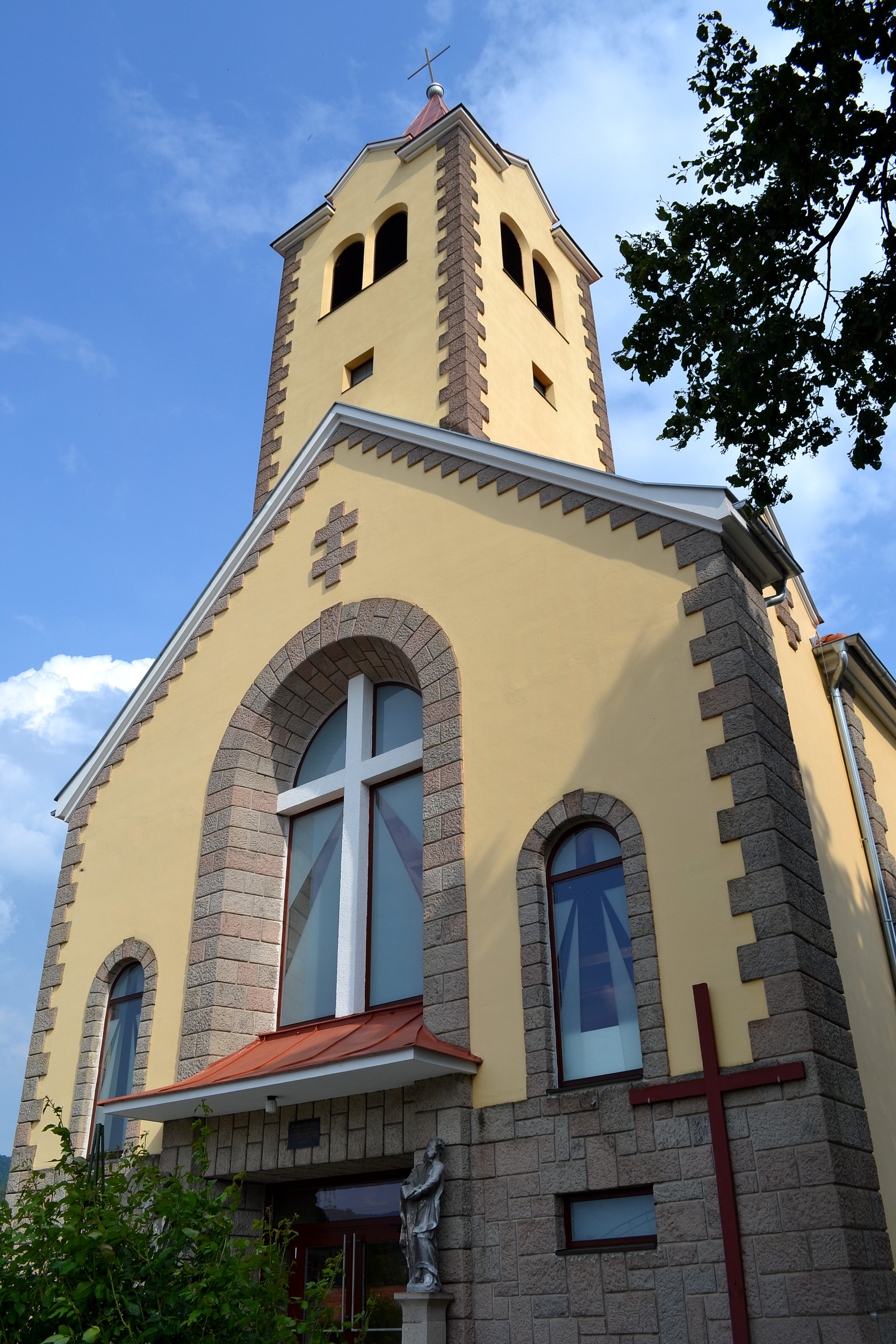 Priečelie farského Kostola Krista Kráľa v Obyciach